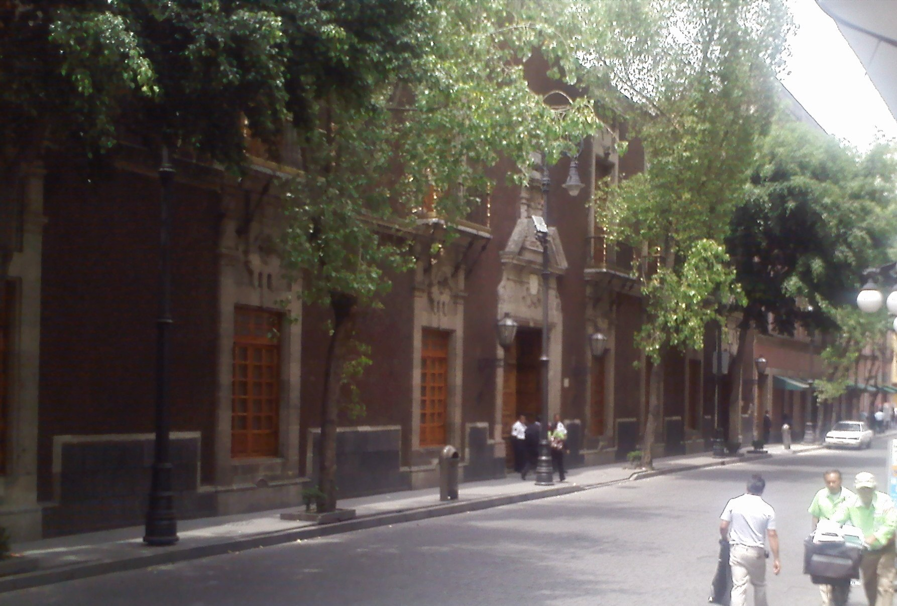 Fachada del edificio ubicado en Donceles 39 del Centro Histórico de la Cuidad de México